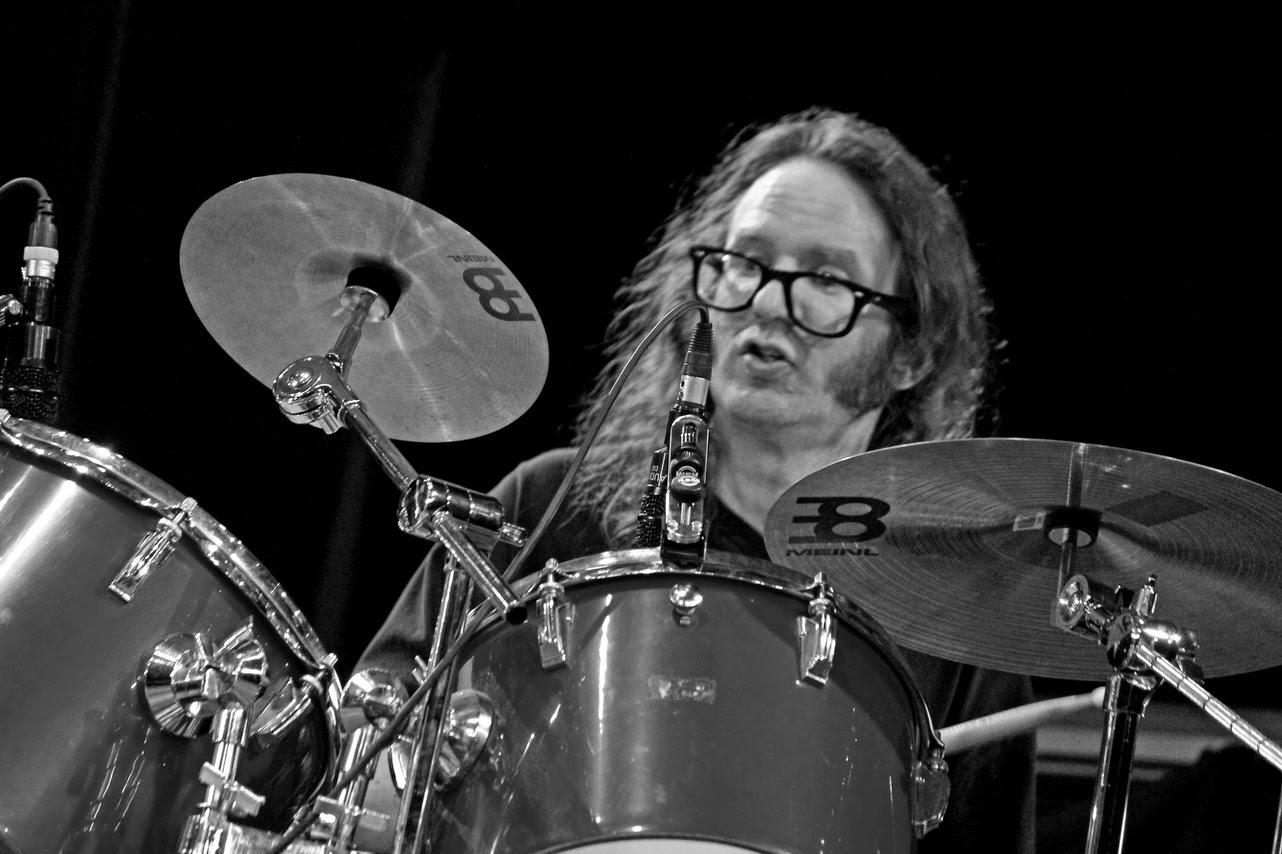 Der deutsche Schlagzeuger Tromla beim Jazzfestival St. Ingbert 2015